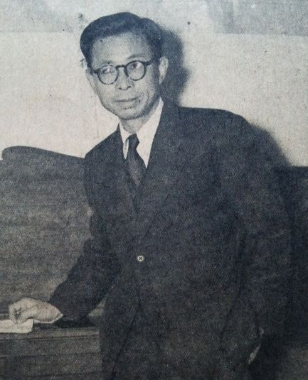 大平善梧